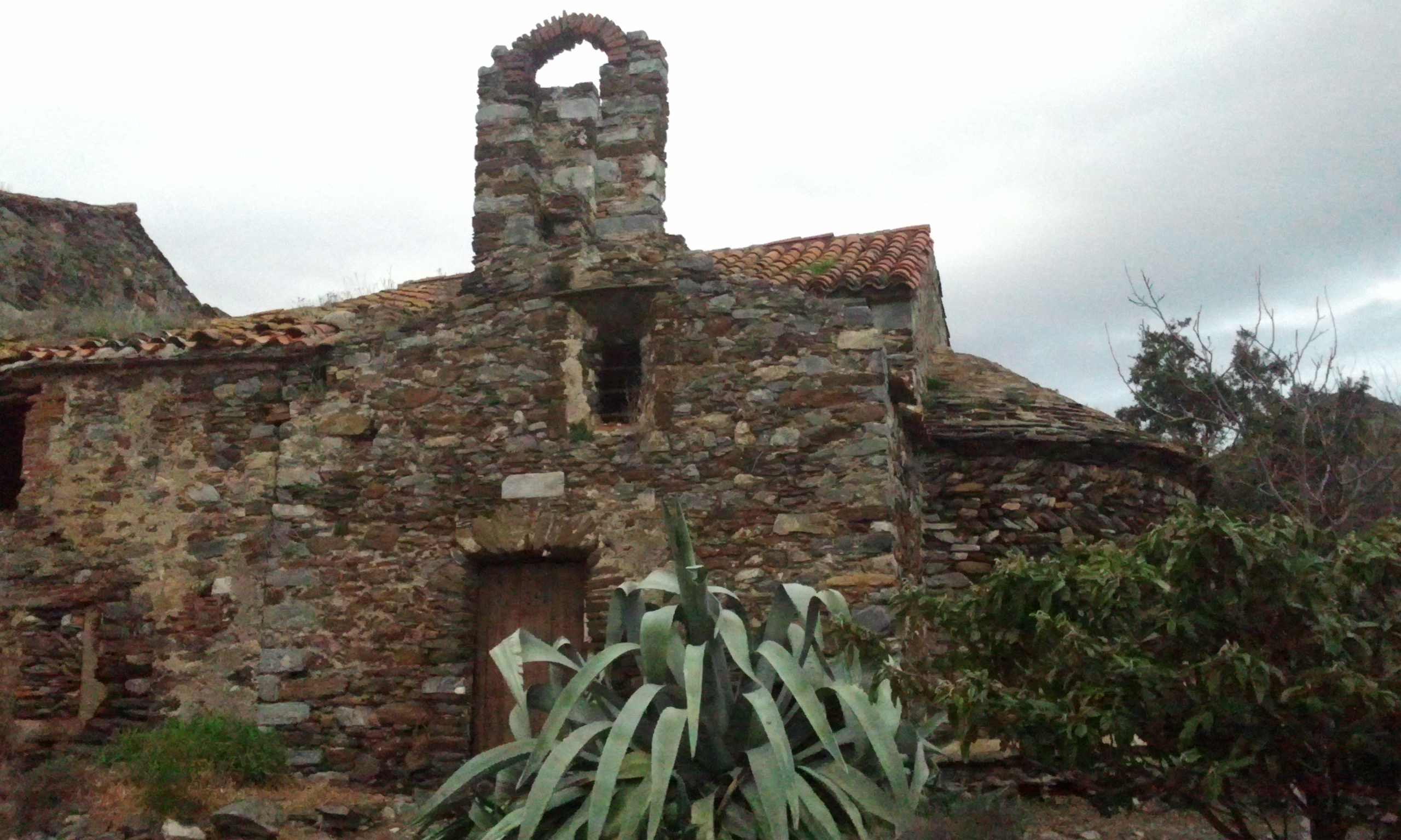 Eglise du Mas des Abeilles à Banyuls-sur-Mer